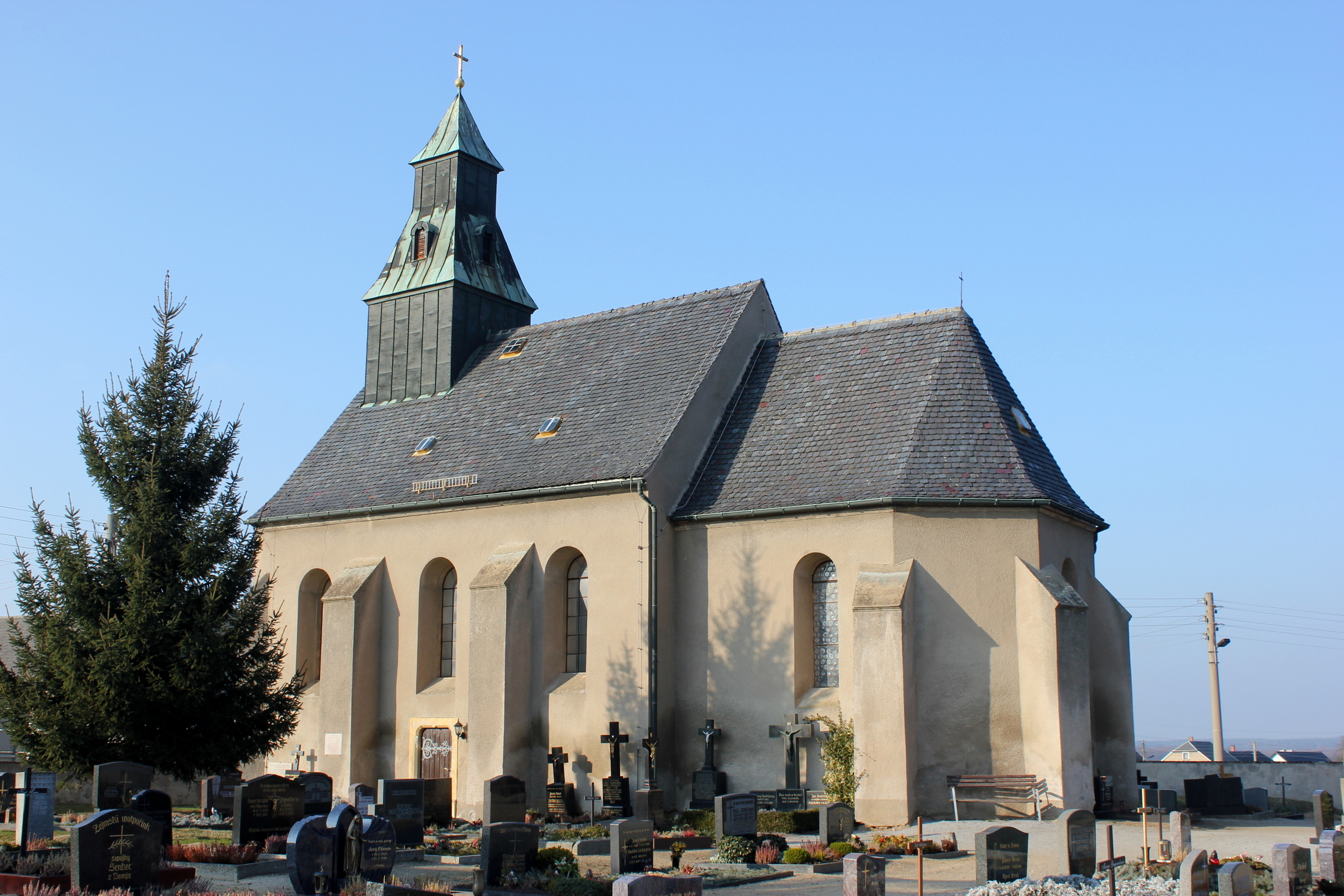 Hornjoserbsce: Radwor; Křižna cyrkej a kěrchow